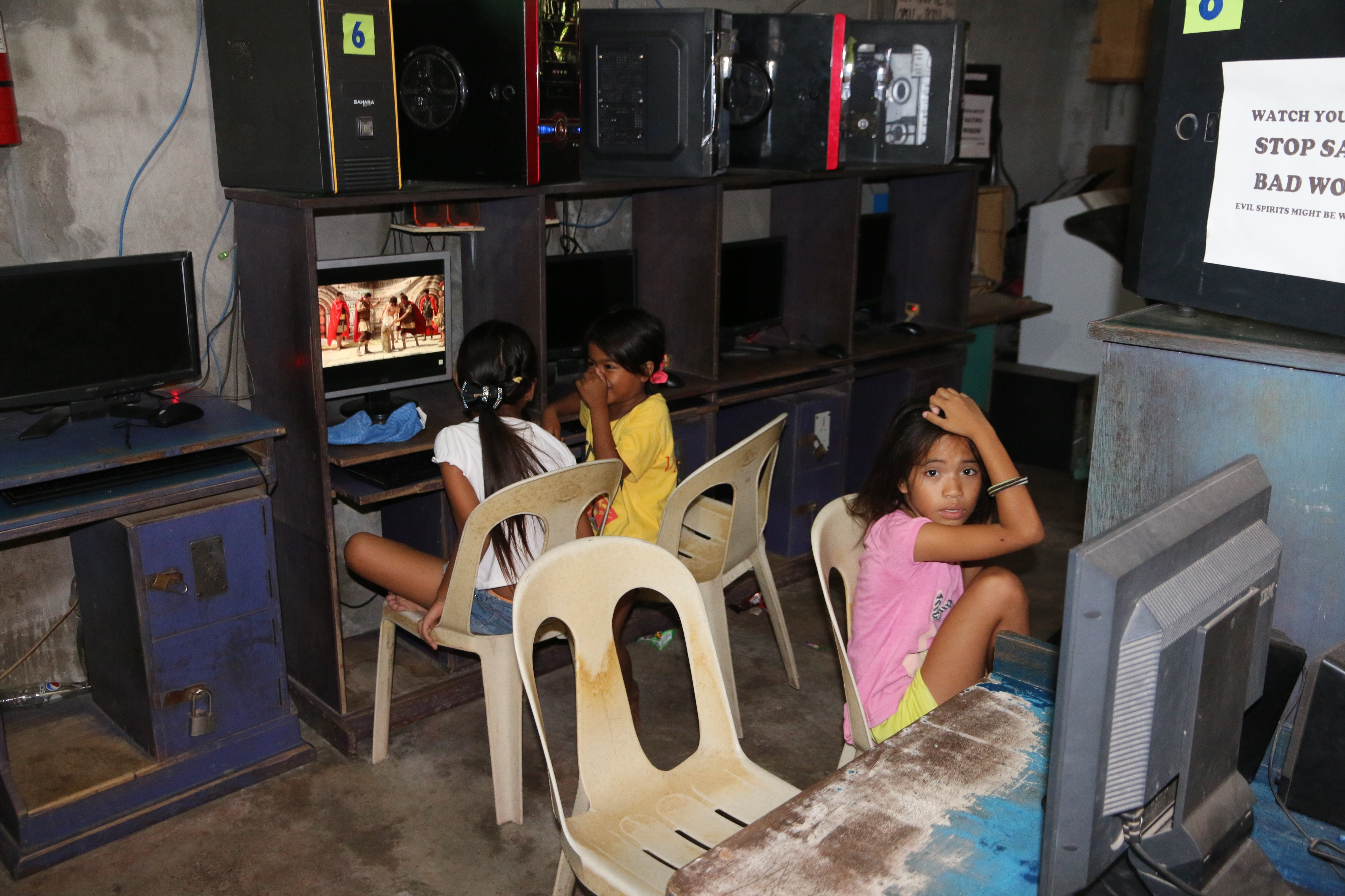 Internet of cebu slums